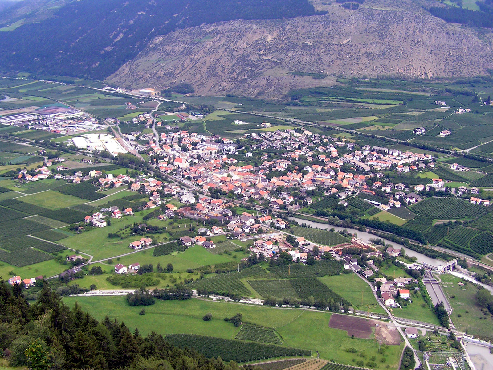 Blick auf die Gemeinde Laas. Oben links in weiß das Marmorwerk.